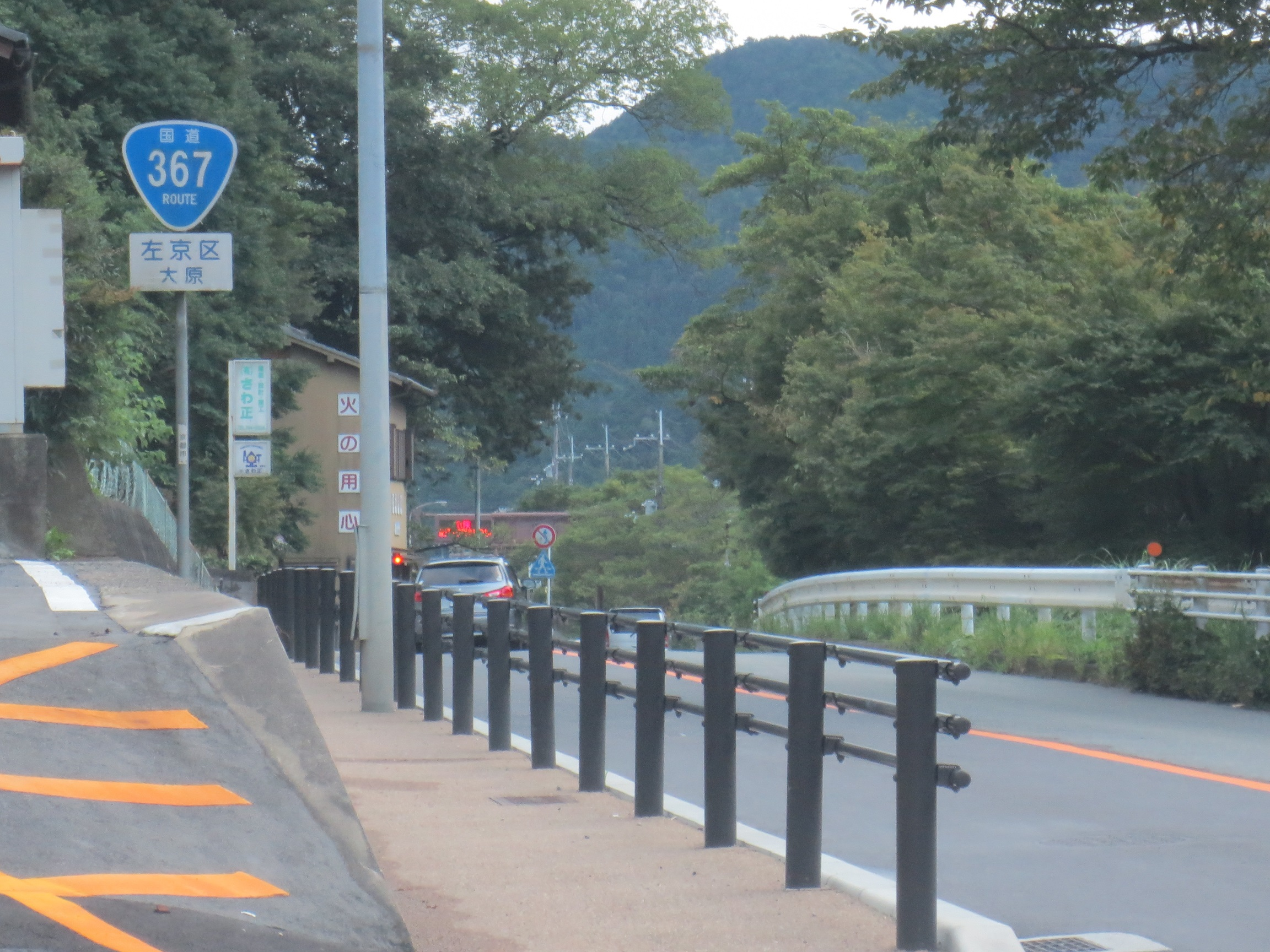 京都市左京区大原付近の国道367号。